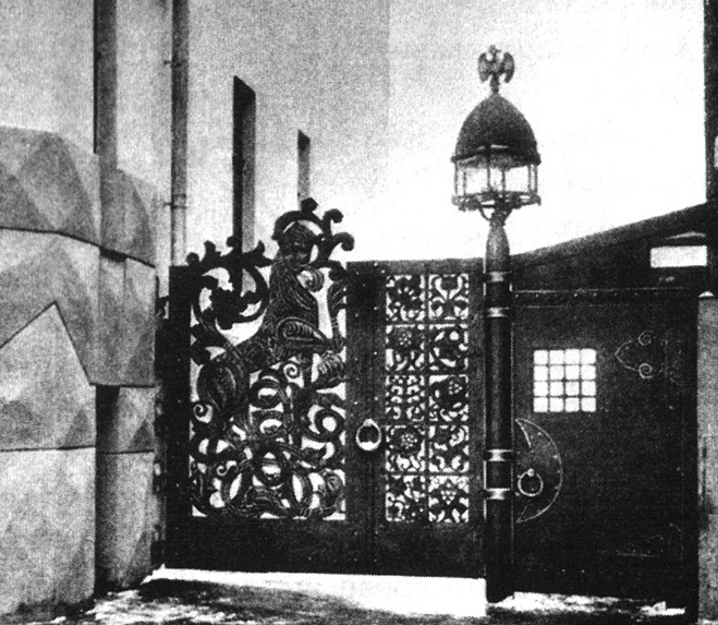 Калитка - доходный дом церкви св. Троицы Живоначальной, что на Грязех